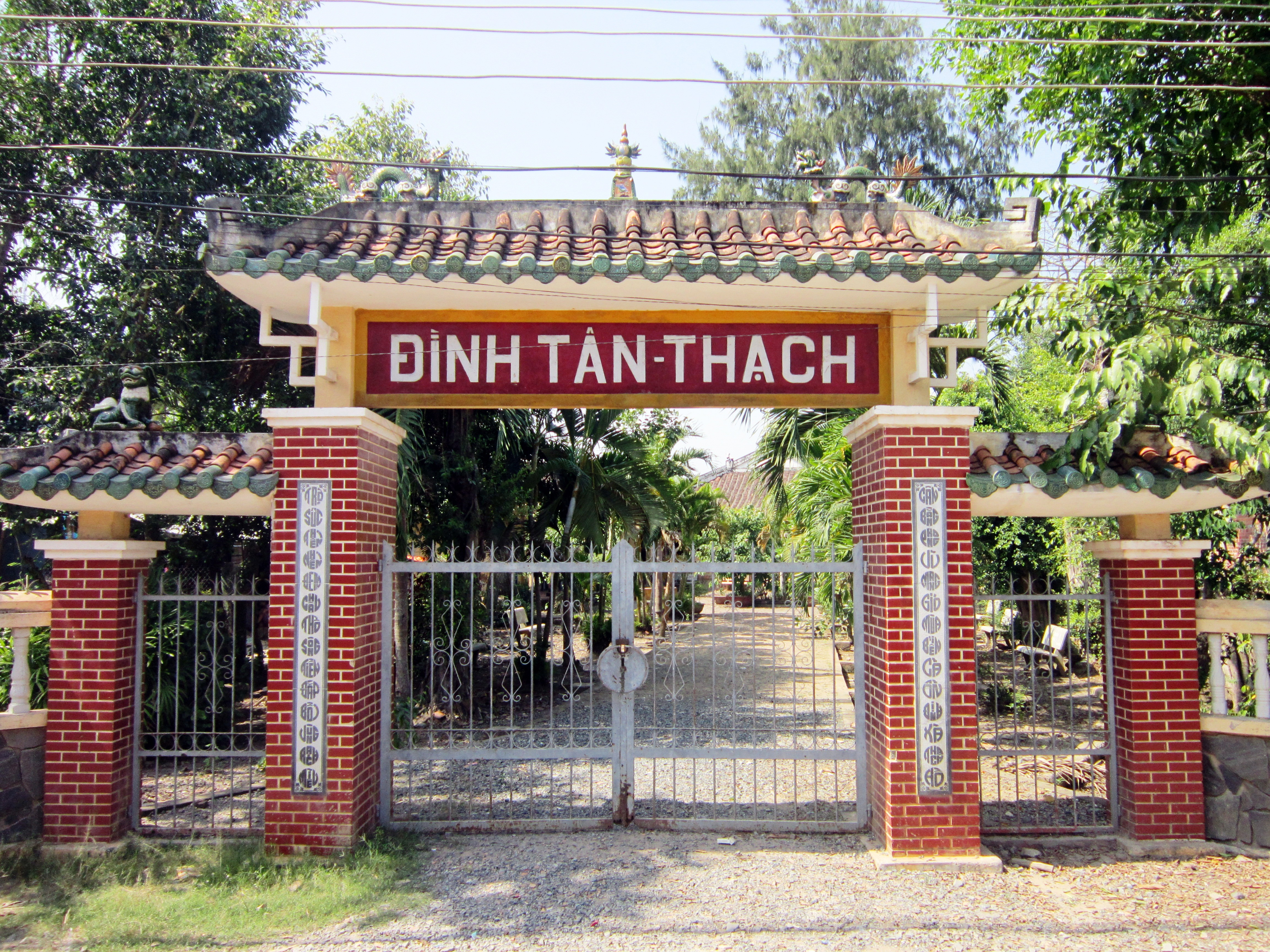 Đình Tân Thạch là một ngôi đình cổ; hiện tọa lạc tại ấp 9, xã Tân Thạch, huyện Châu Thành, thành phố Bến Tre, Việt Nam.